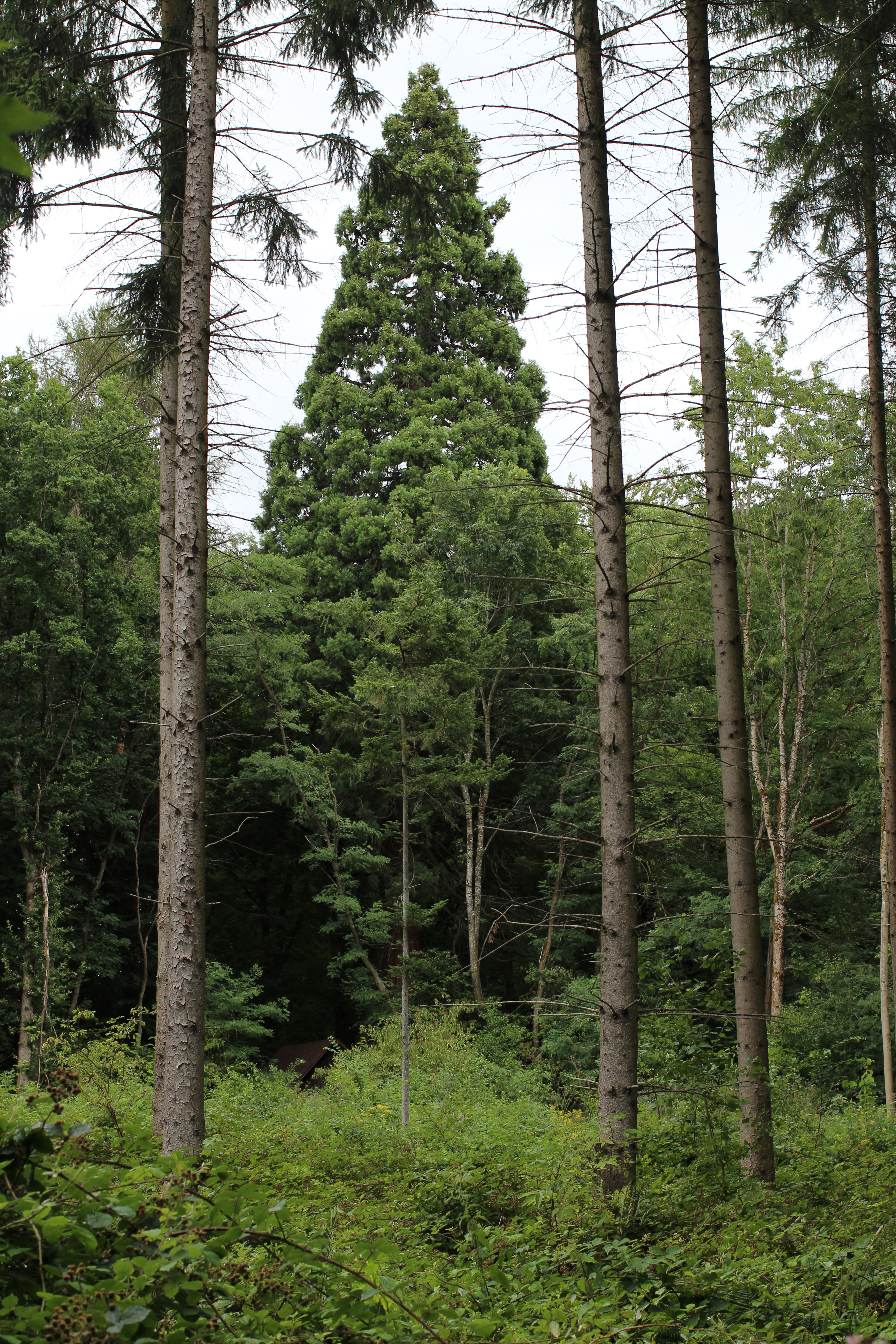 Waldlichtung direkt vor dem Mammutbaum, links unten am Fuß die Holzhütte. Sommer 2015. Entfernung Fotoapparat/Baum rund 50 Meter.